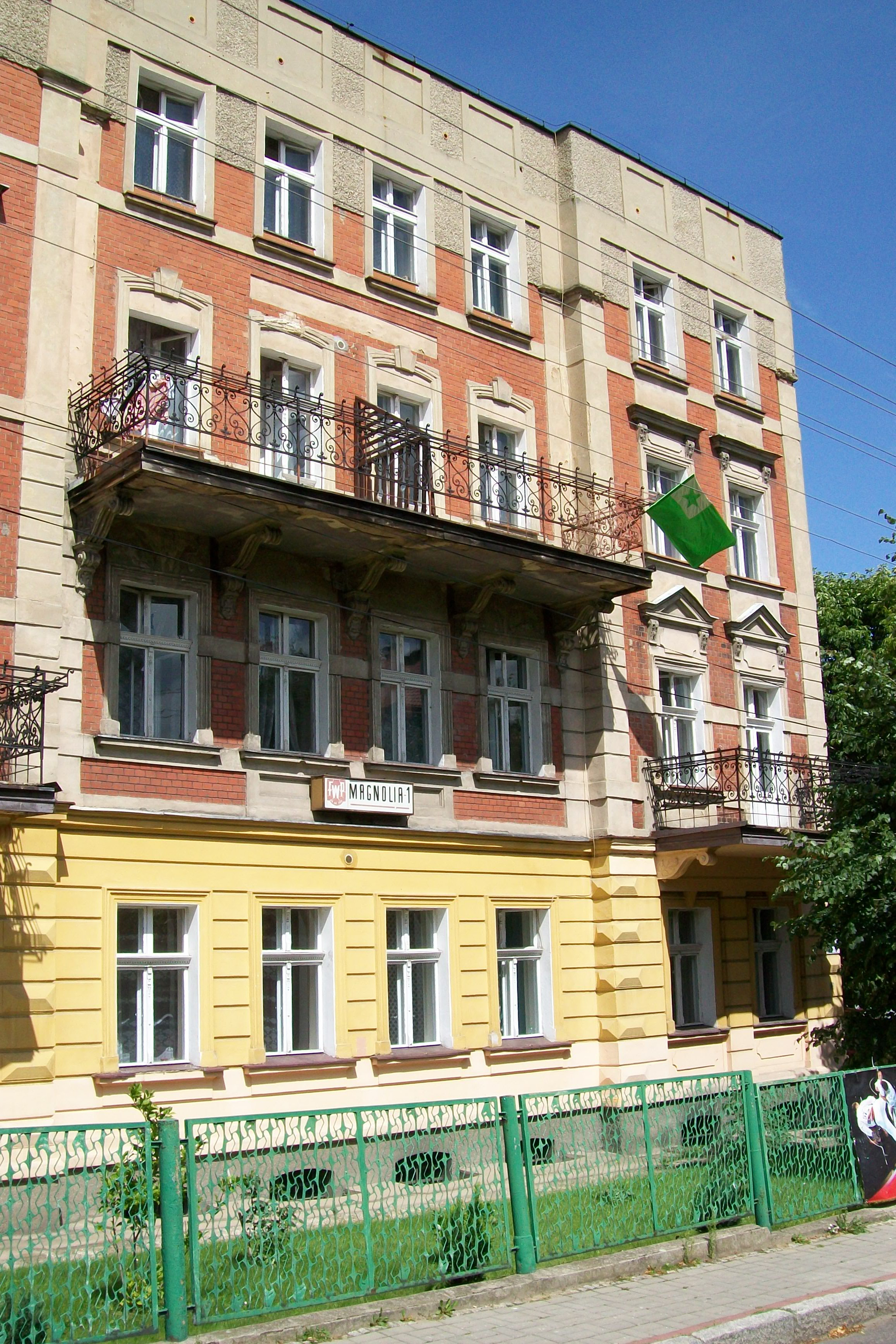 Das Gästehaus "Magnolia" in Szczawno Zdrój / Bad Salzbrunn (Polen) von außen.